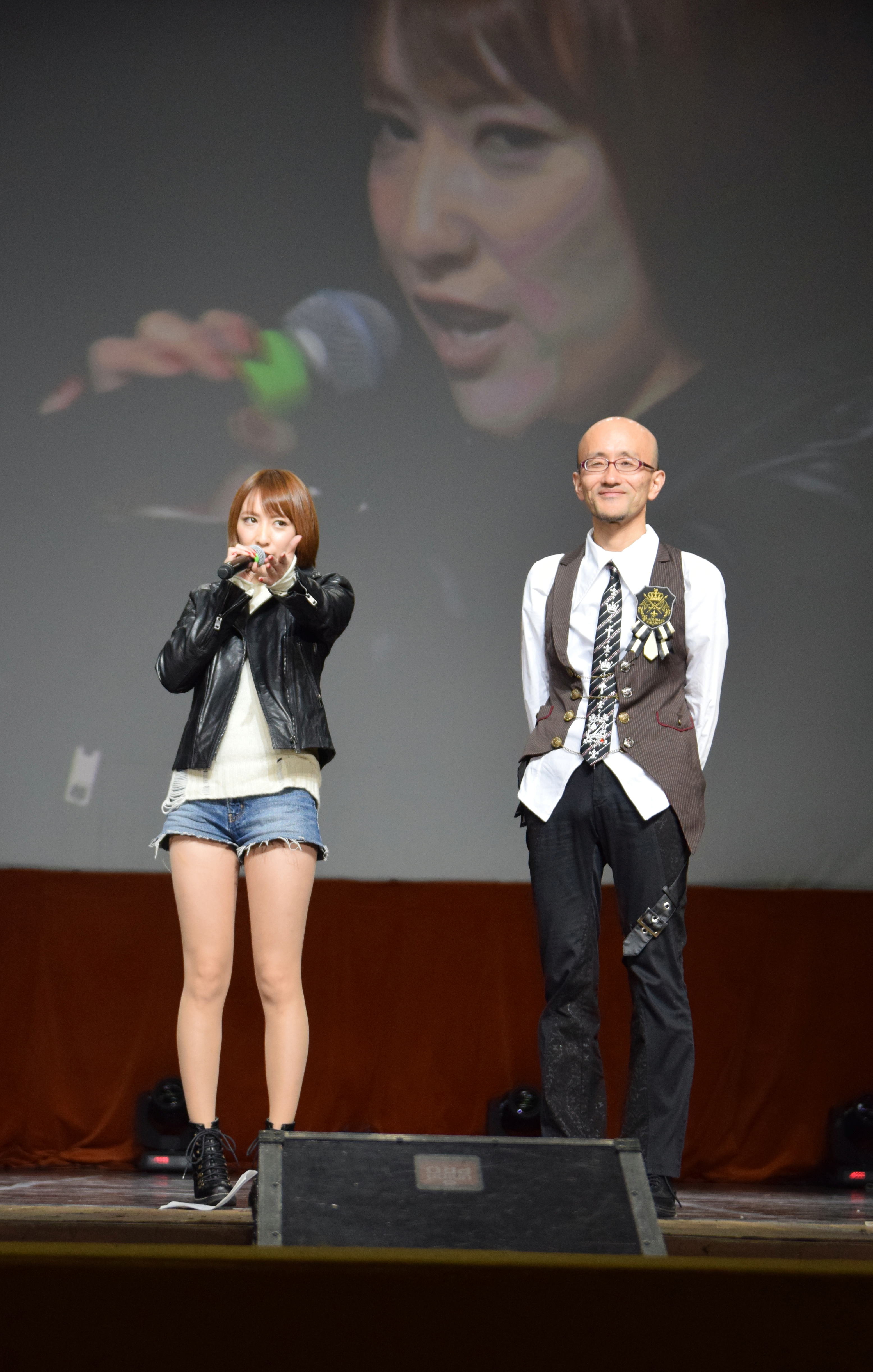 Aoi Eir